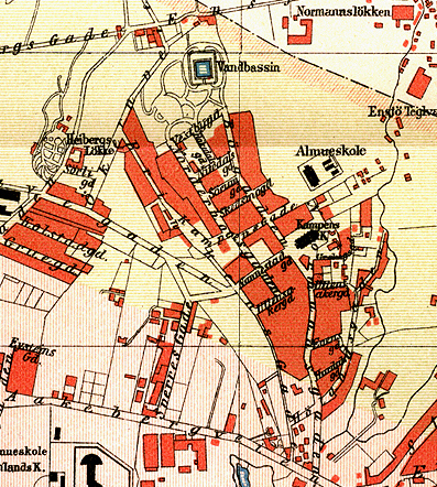 Kart over Kampen, Oslo, 1887